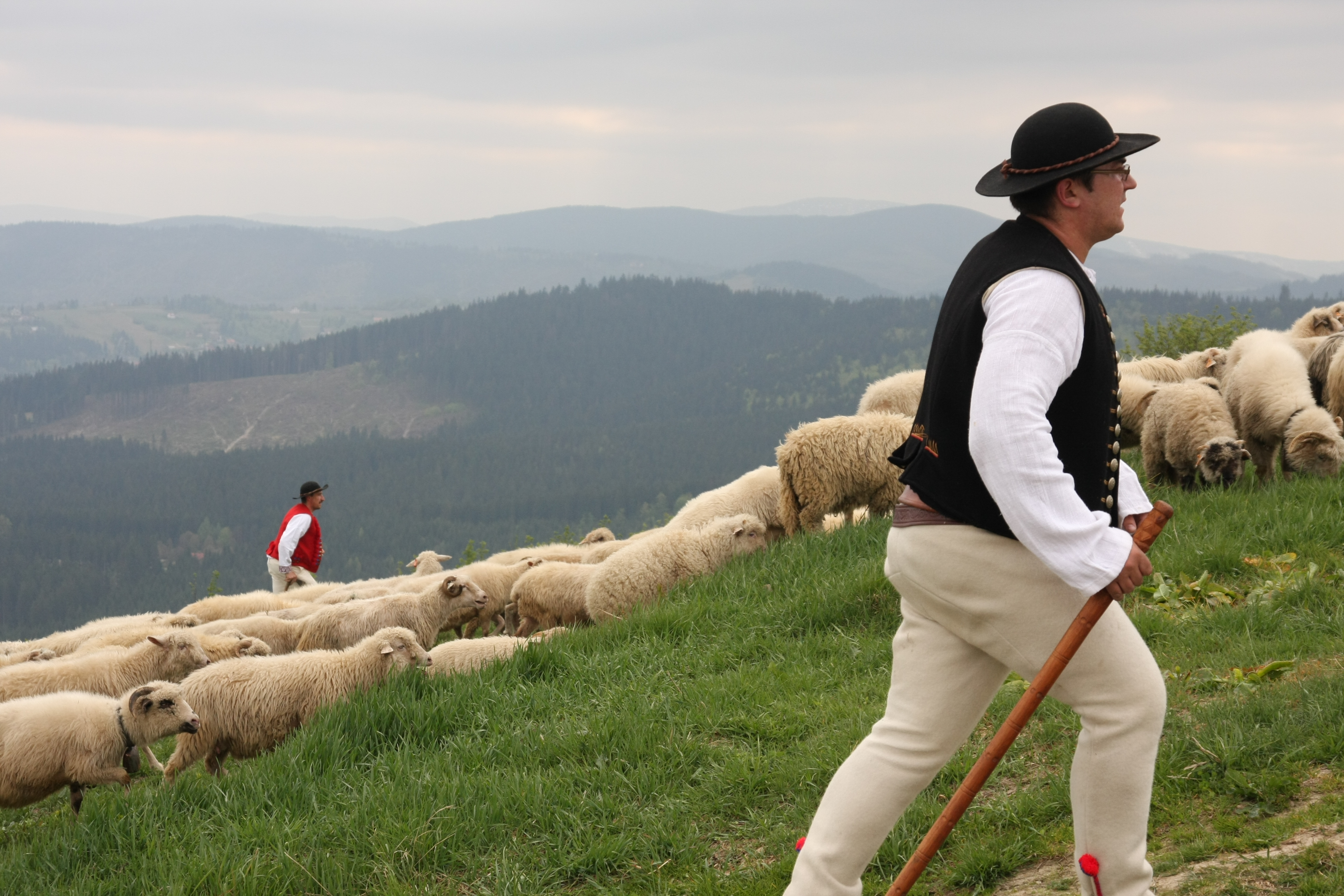 Corocznie w Koniakowie z początkiem maja odbywa się wiosenny redyk tzw. miyszanie owiec, podczas którego kilka mniejszych stad łączy się w jedno wielkie. Gazdowie oddają pod opiekę swoje stada bacy, który wraz z juhasami wyrusza na redyk na Ochodzitą. W tym dniu można zobaczyć odświętne regionalne stroje, usłyszeć głos trombity oraz zobaczyć pastereskie zwyczaje np. poświęcenie stada, okadzanie koszora i miyszani owiec wokół moja ustawionego na szczycie Ochodzitej.